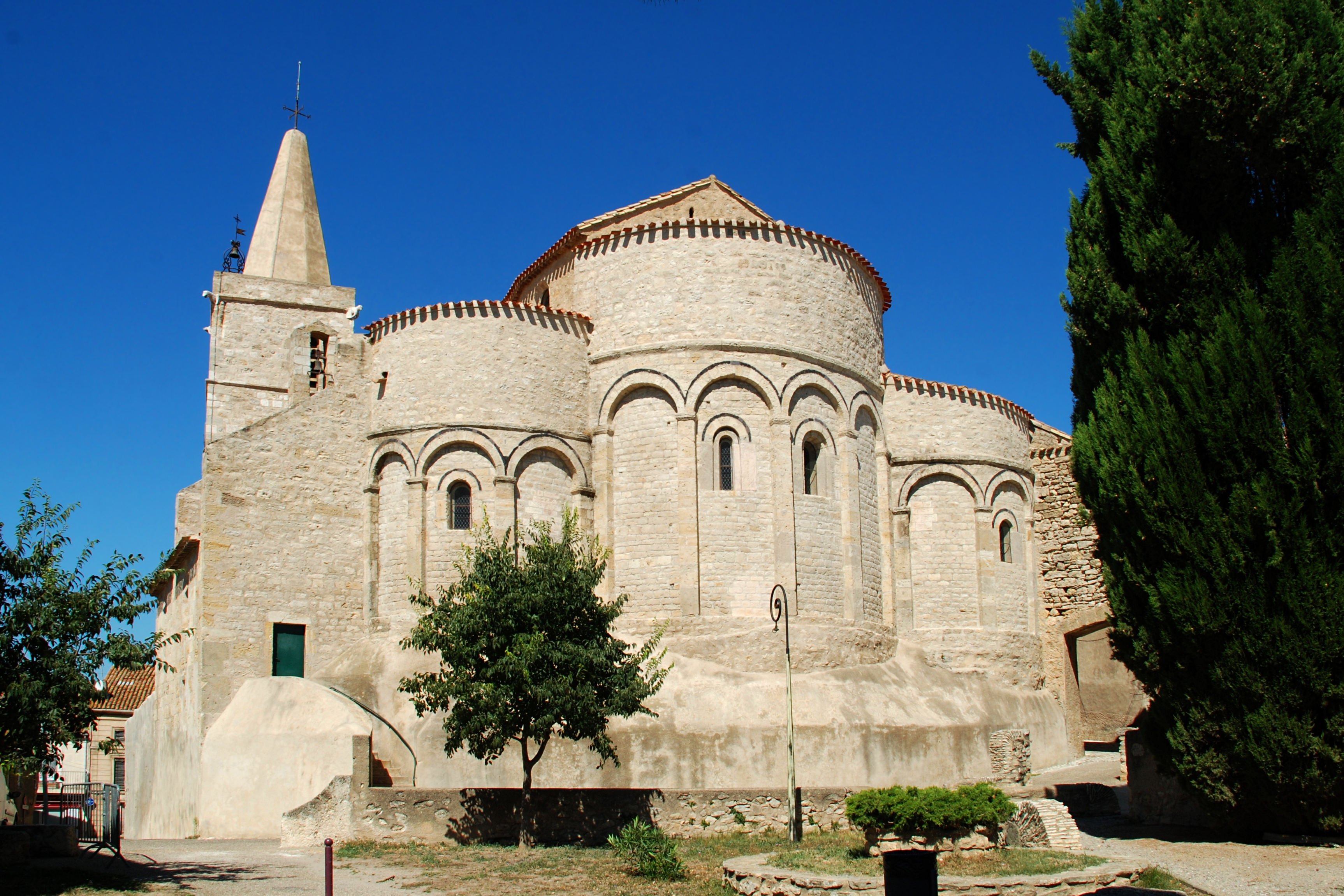 France - Languedoc - Aude - Église Saint-Jean l’Évangéliste d'Ouveillan